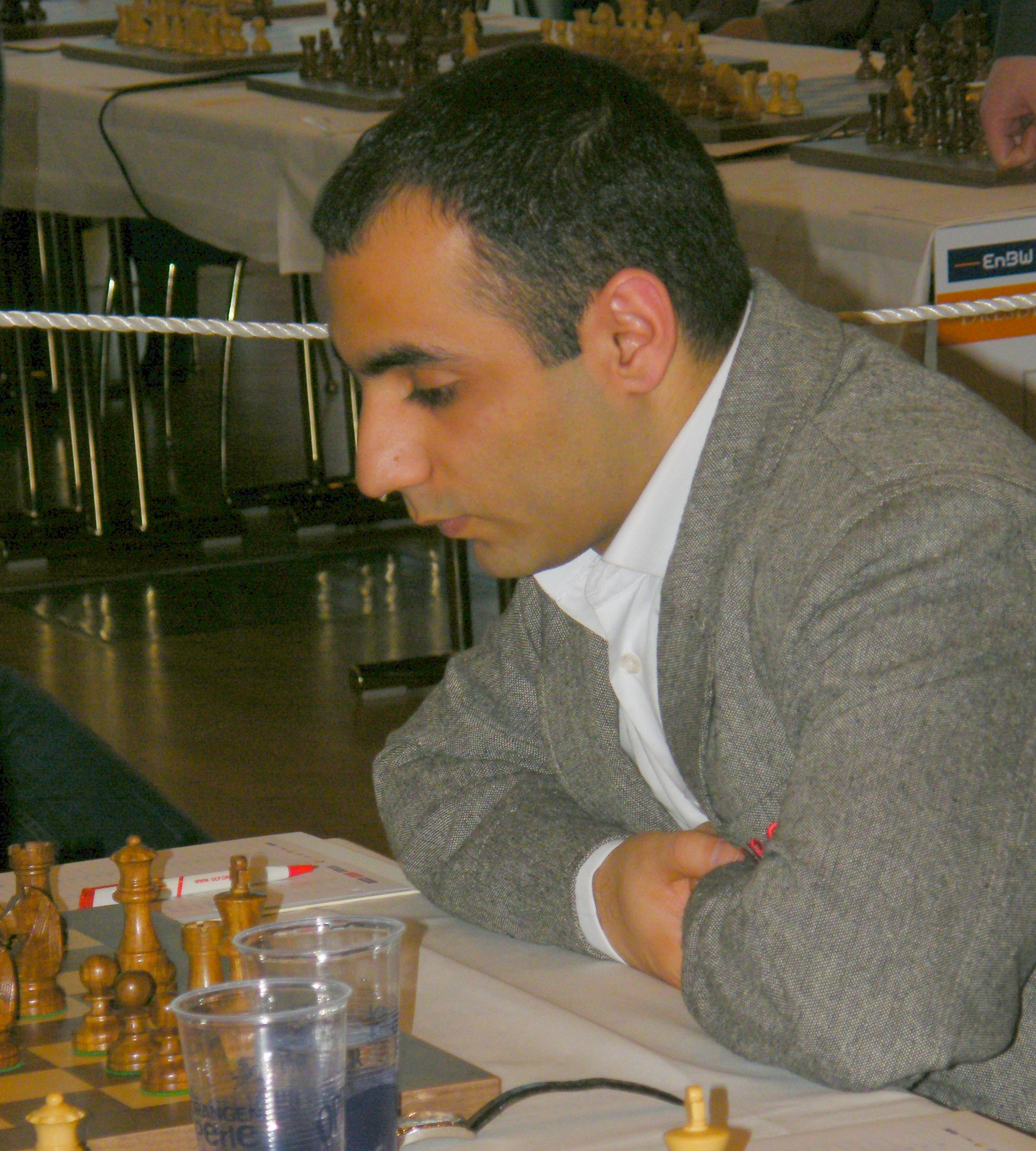 David Arutinian bei der 38. Schacholympiade in Dresden 2008